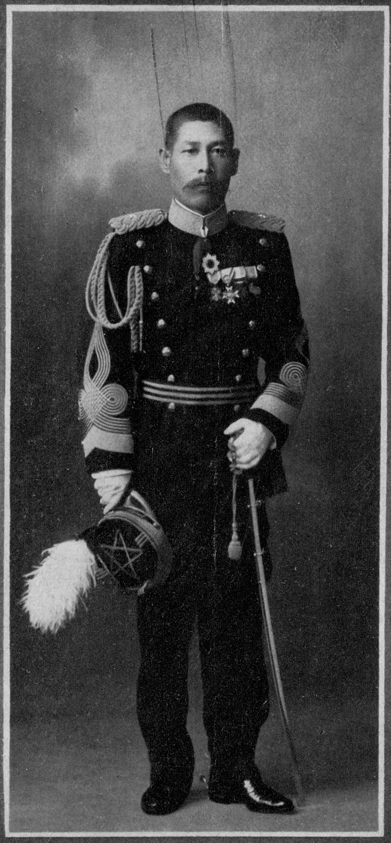 陸地測量部長時代